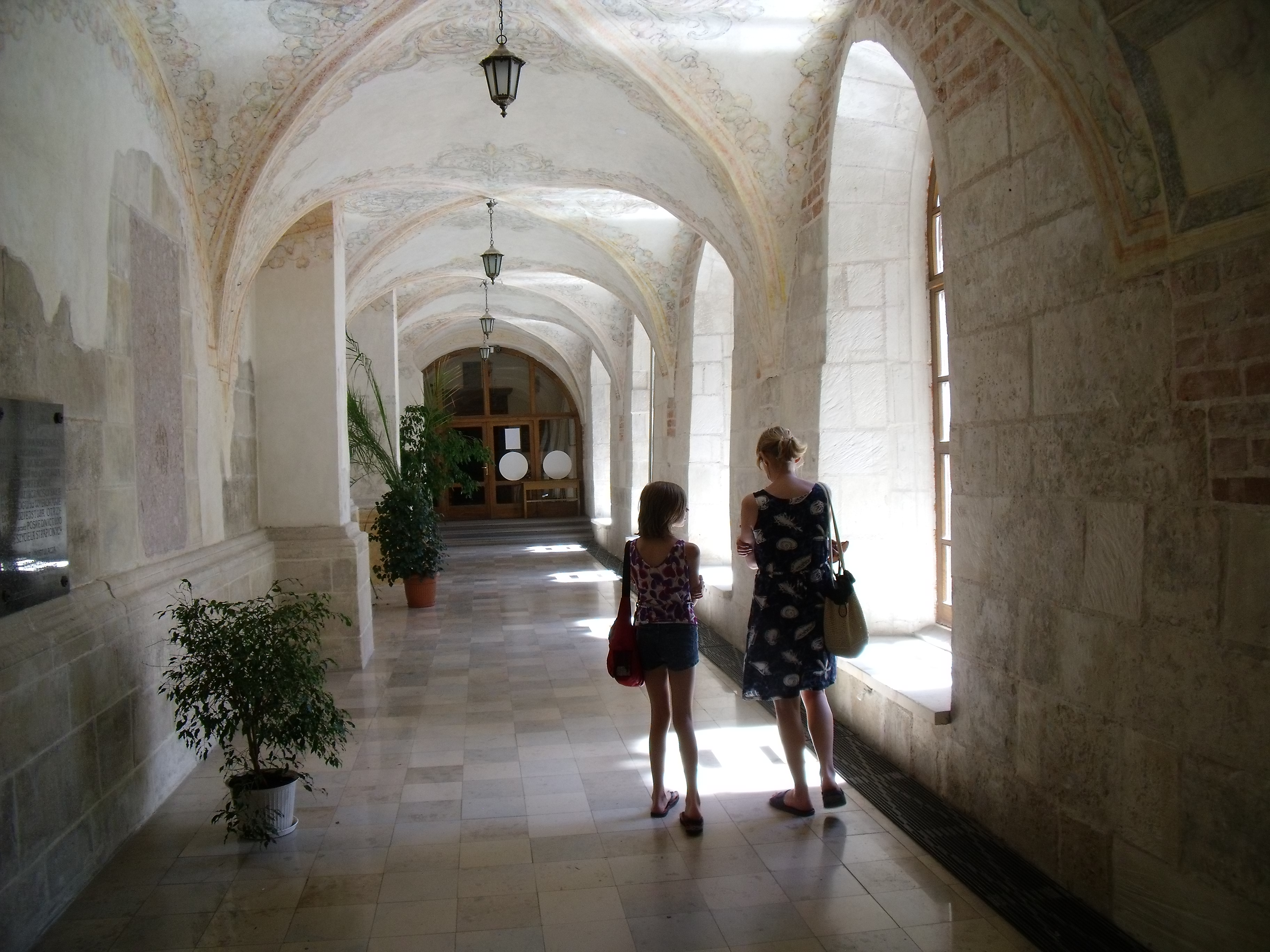 Opactwo cystersów.